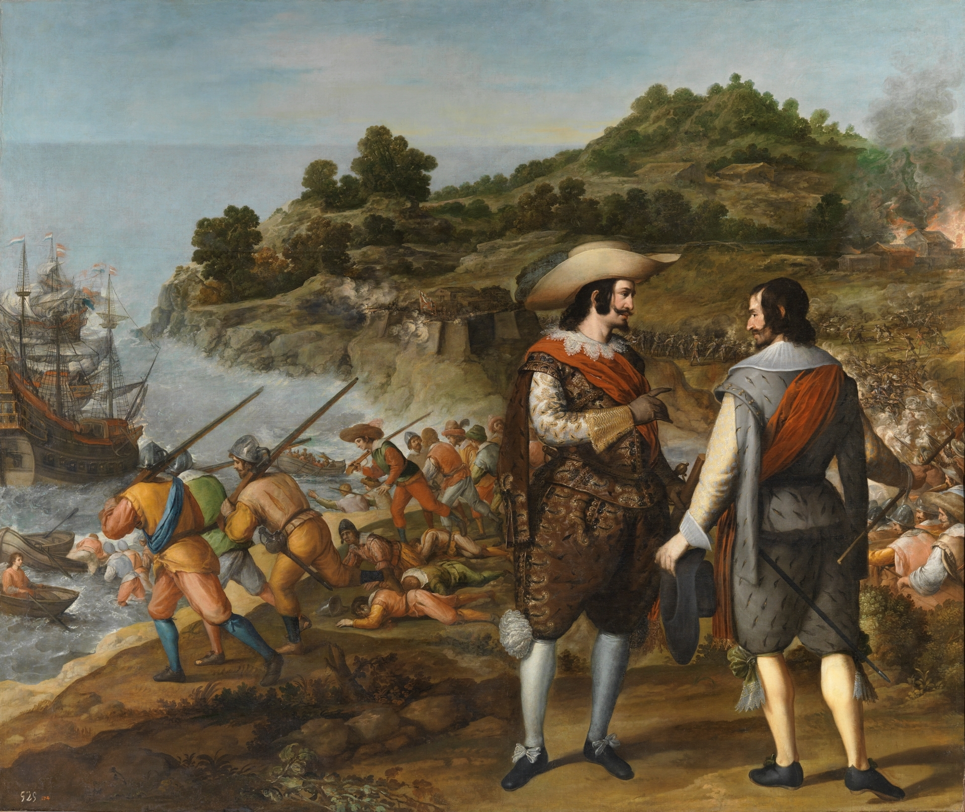 La obra representa la recuperación de la Isla de Puerto Rico en 1625 por las tropas españolas a las órdenes de Juan de Haro y Sanvítores (1545-1631), gobernador de Puerto Rico y caballero de la Orden de Santiago.